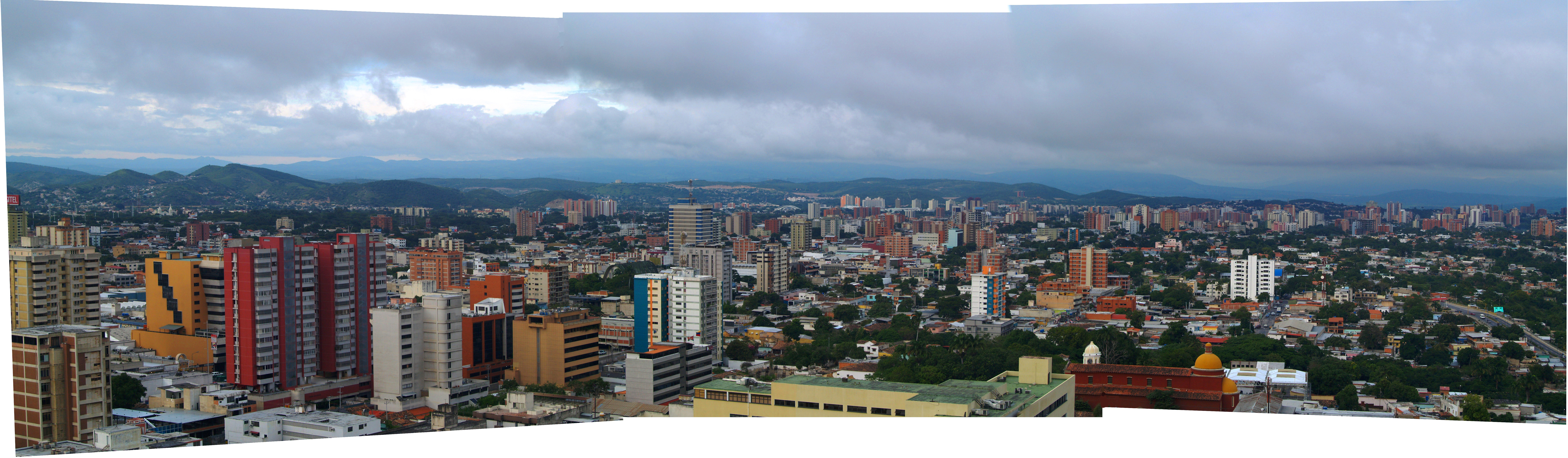 Centro y Este de Barquisimeto